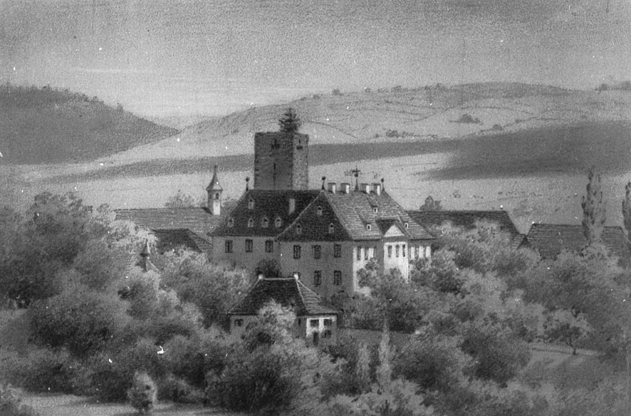 Bleistiftzeichnung des Unterriexinger Schlosses